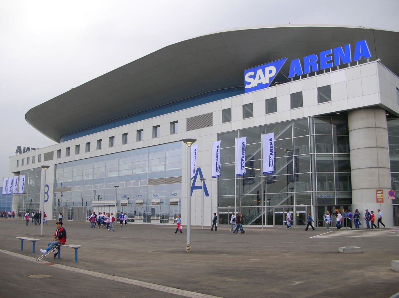 SAP Arena Ansicht von der Straßenbahnhaltestelle.